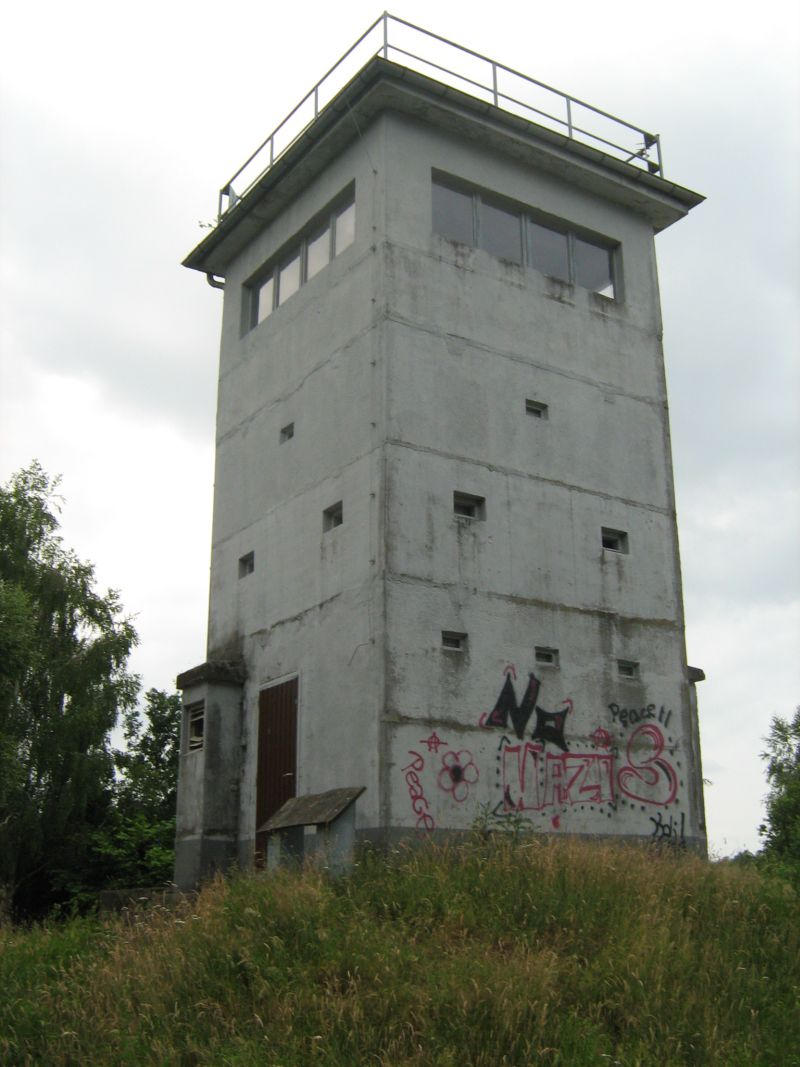 Ehemaliger Wachturm am Grenzstreifen bei Böckwitz-Zicherie